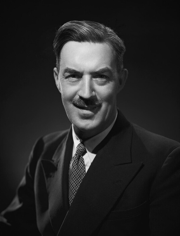 Frank markam